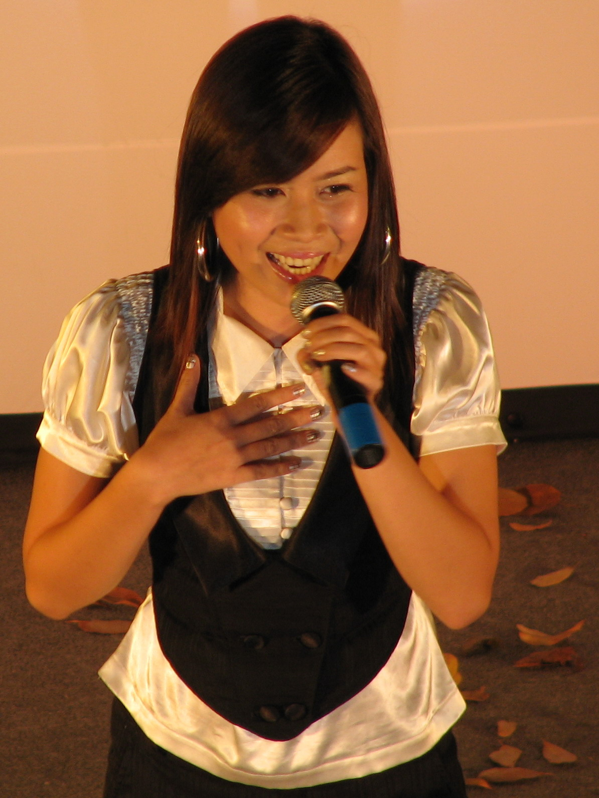 Vietnamese female vocalist Luu Huong Giang performing in 2006